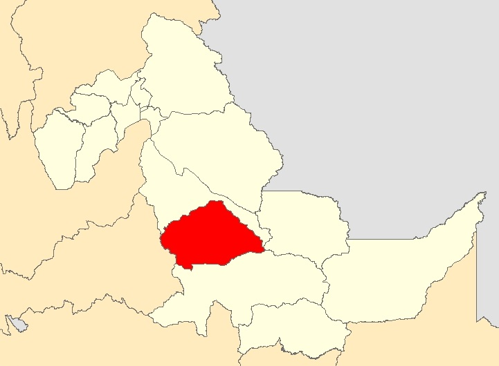 Mapa distrito Tahuania,Ucayali - Perú